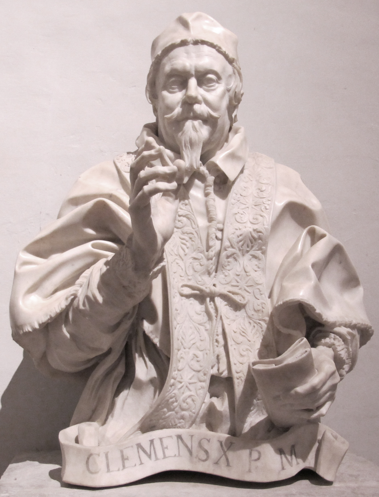 Gianlorenzo bernini, busto di Clemente X